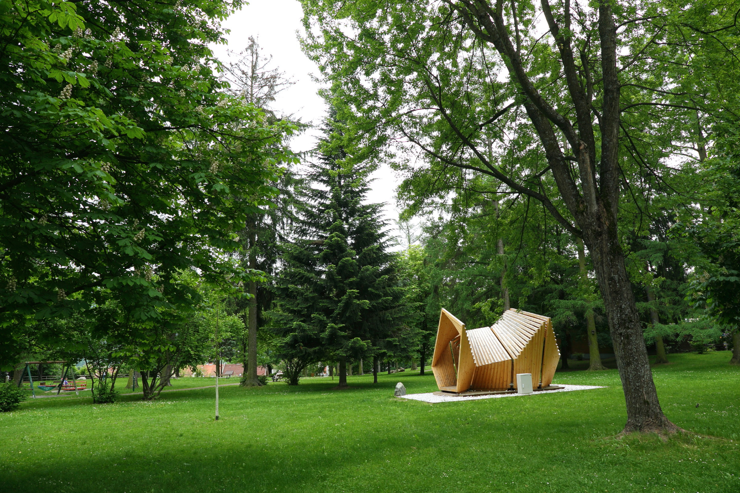 Stadtpark. Freiheitsallee und Parkstraßenallee This media shows the Geschützter Landschaftsteil in Styria with the ID GLT_0186.